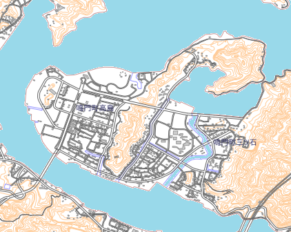 徳島県鳴門市高島の地図